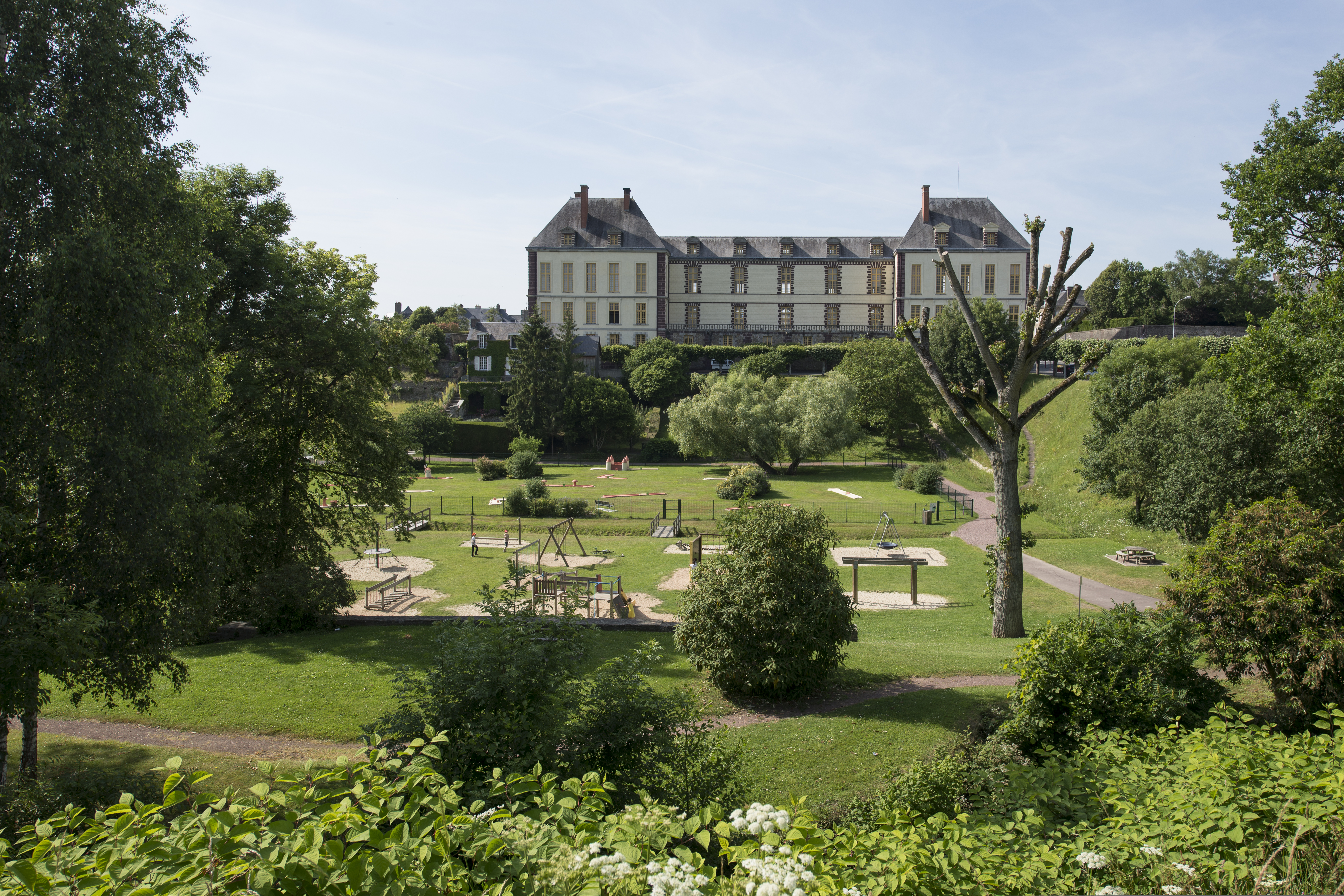 Château des Matignon, Torigni-sur-Vire, Manche, 2017. .